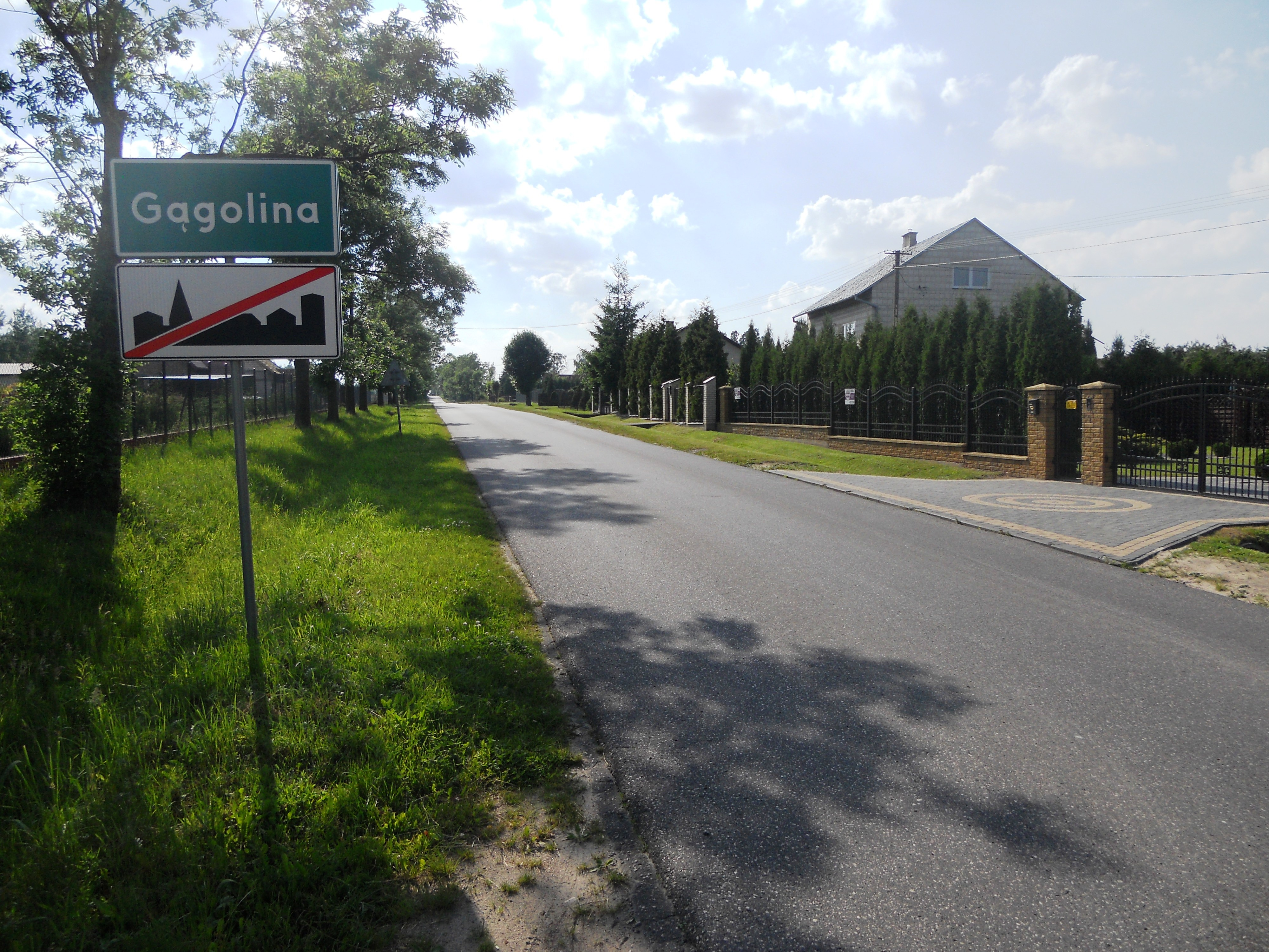 Wieś w gminie Siennica